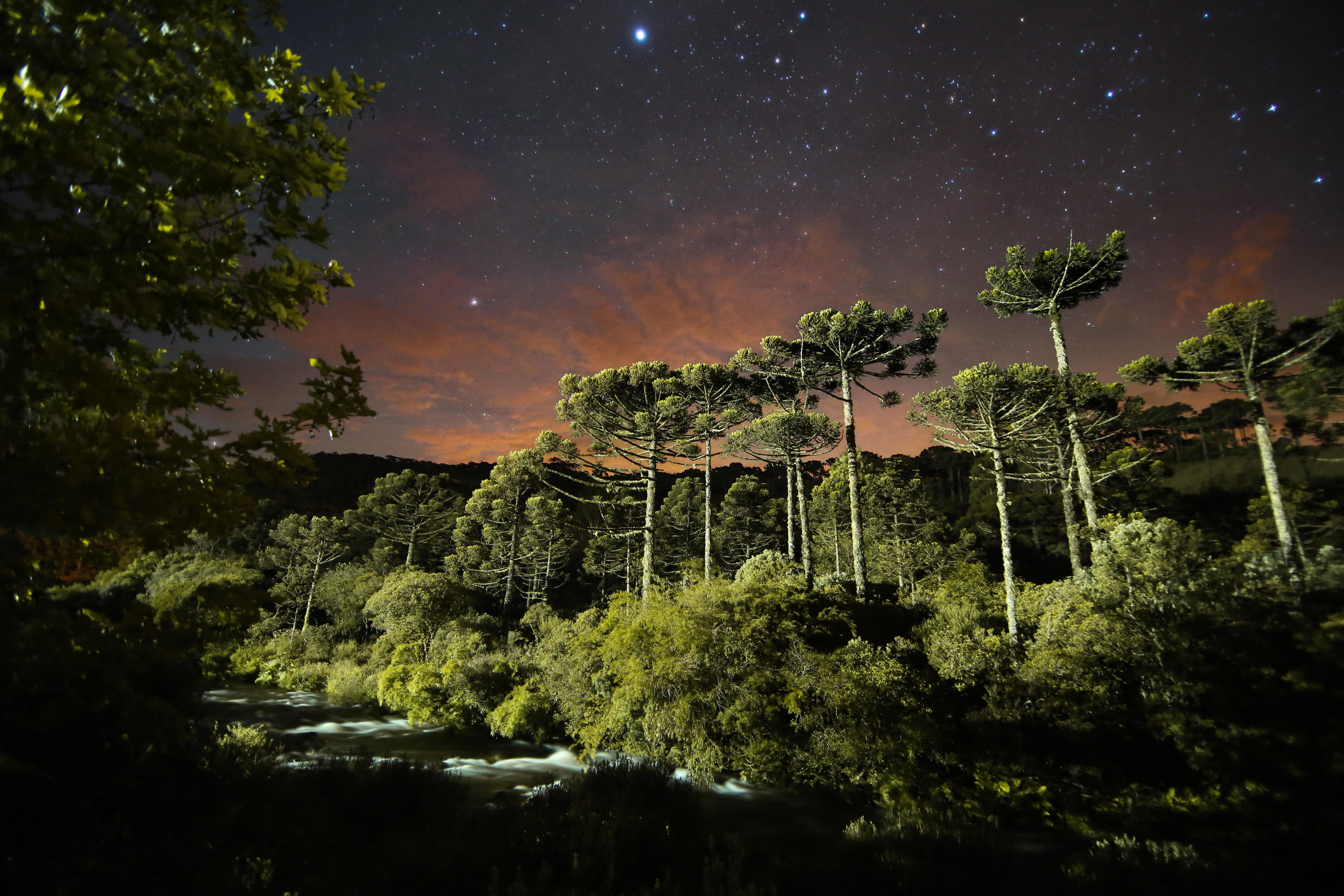 Araucarias sob as estrelas no Planalto Gaucho.